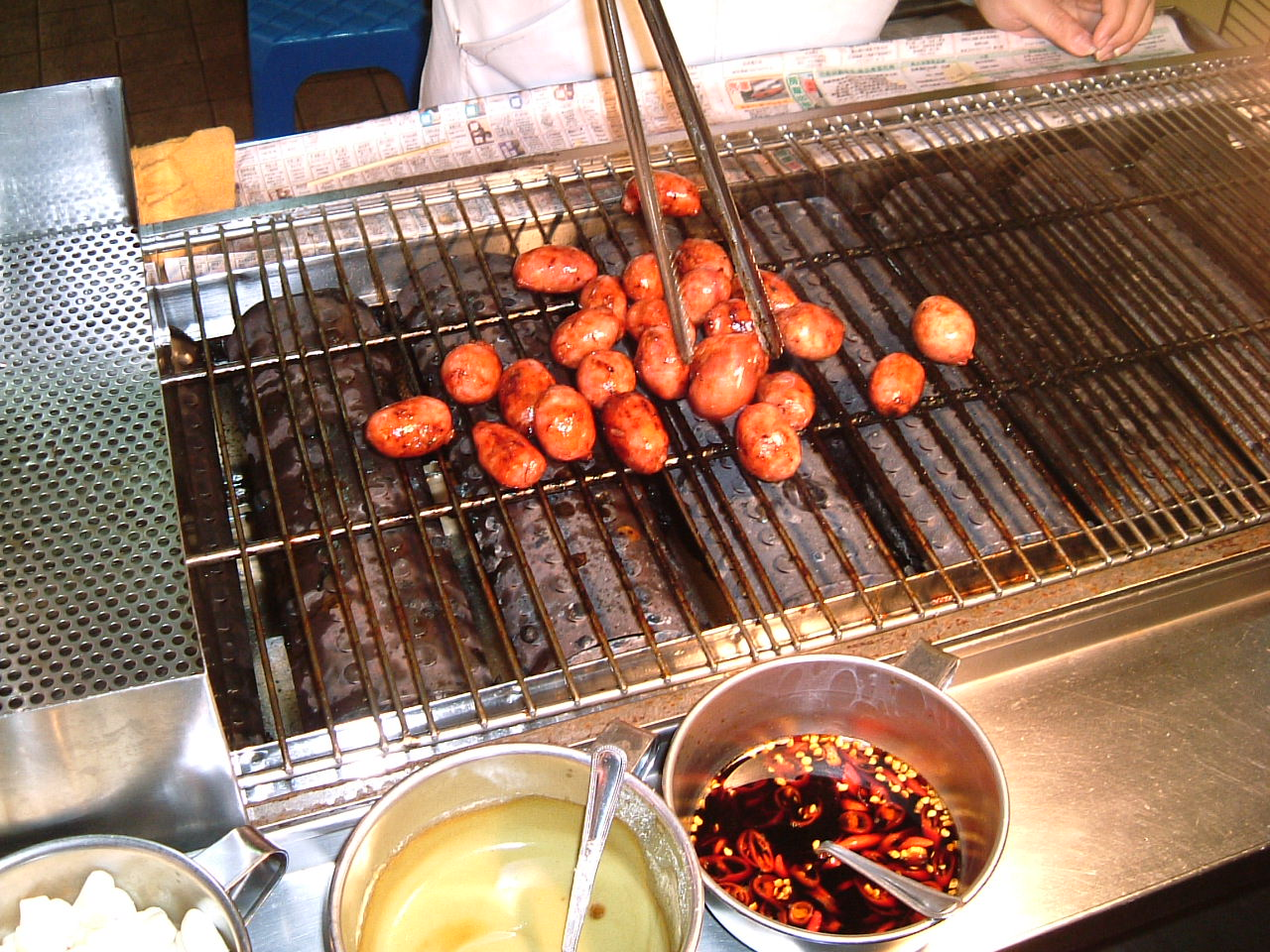 中文（台灣）: 一個夜市攤販正在烤一口香腸。